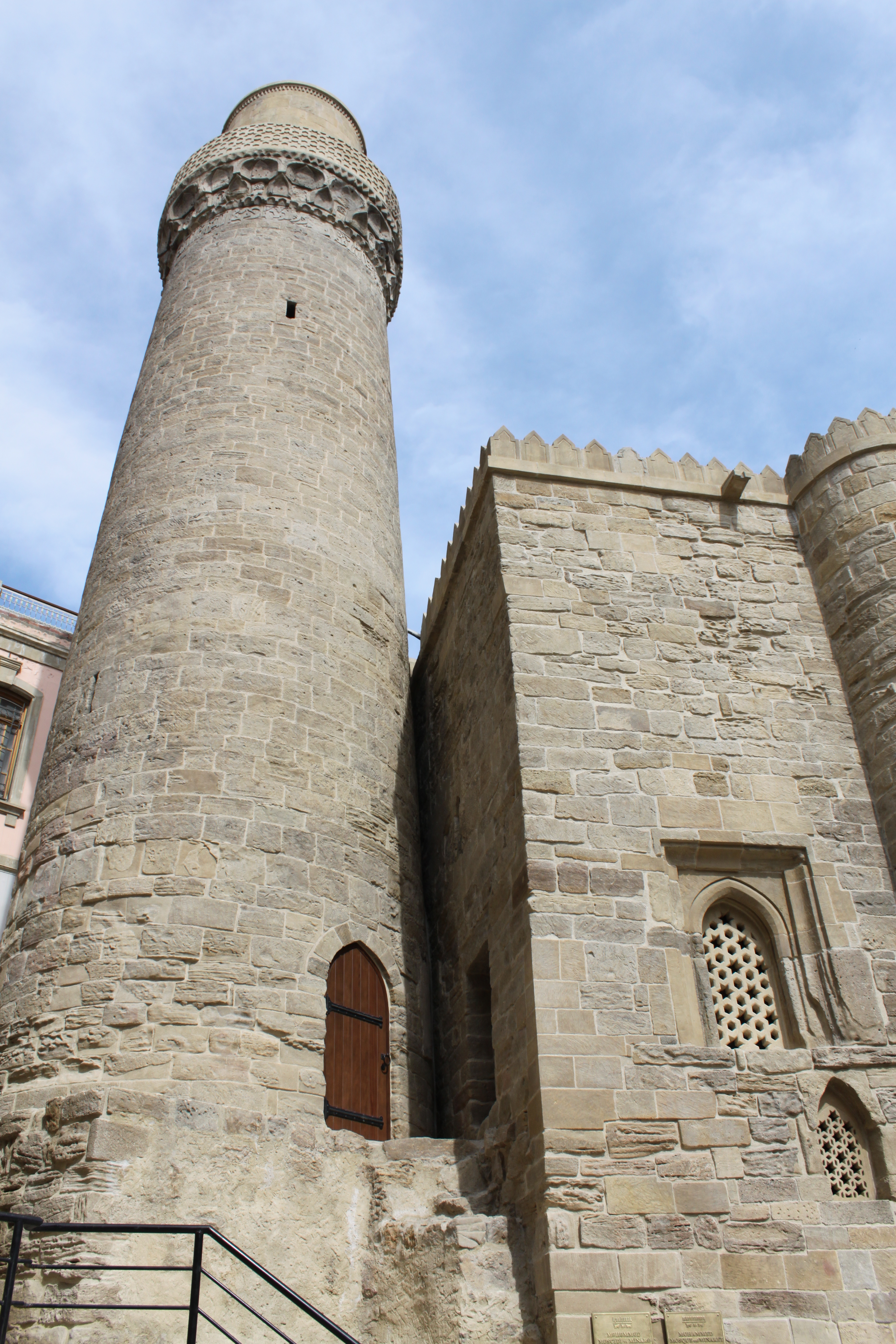 Мечеть Мухаммеда, Ичери Шехер Баку.